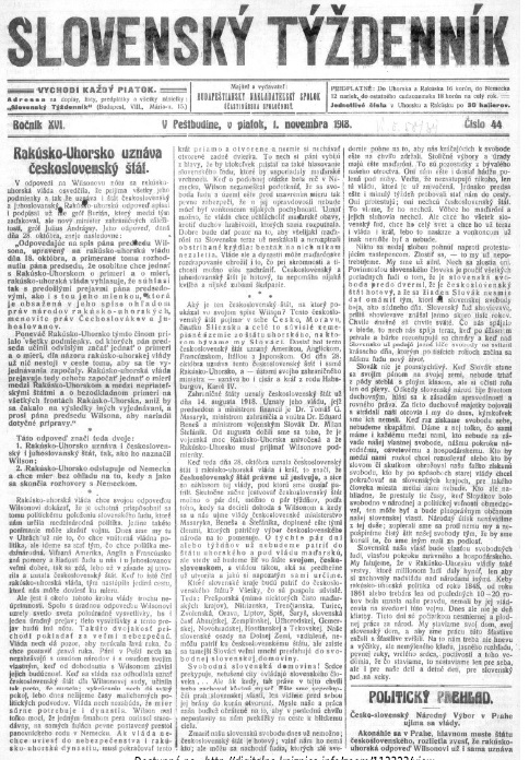 Titulný list periodika Slovenský týždenník, ktoré vychádzalo na Slovensku začiatkom 20. storočia.